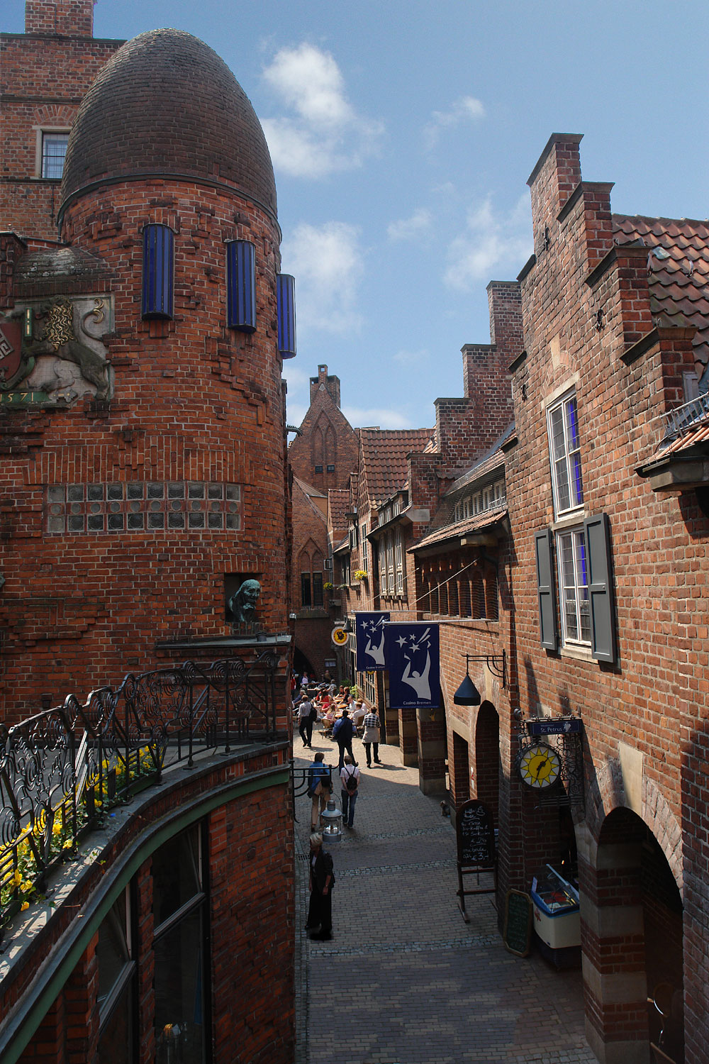 Böttcherstraße Bremen: Blick vom Paula Becker-Modersohn Haus auf Haus St. Petrus Das abgebildete Objekt ist ein geschütztes Kulturdenkmal in der Freien Hansestadt Bremen, mit der Nr. 1499,T beim Landesamt für Denkmalpflege registriert.